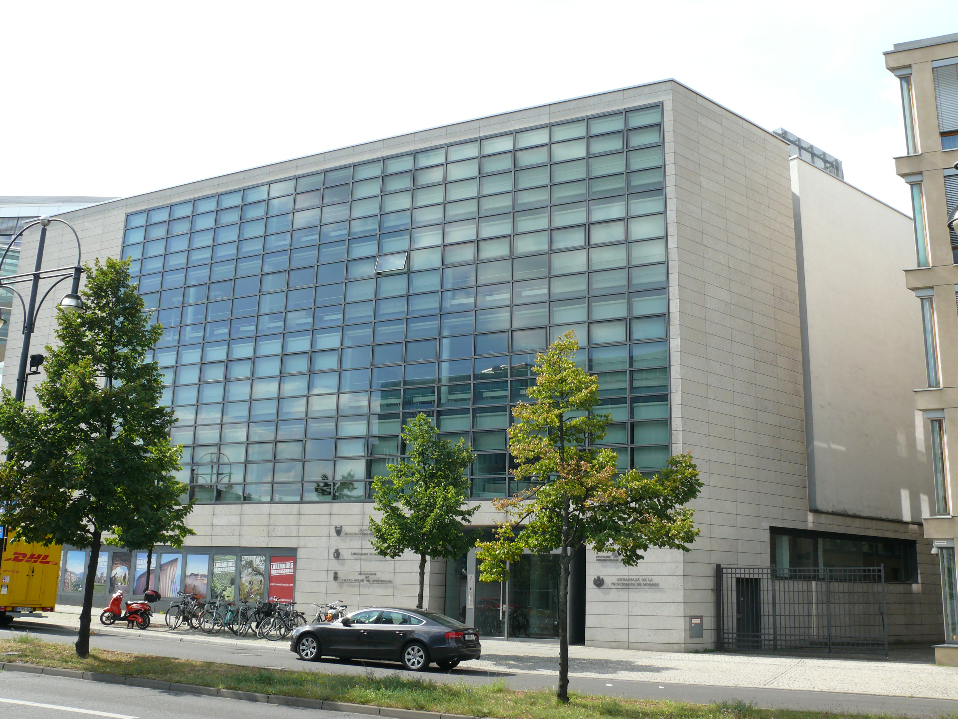 Tiergarten Klingelhöferstraße 7 Botschaftsgebäude Luxemburg, Malta, Monaco